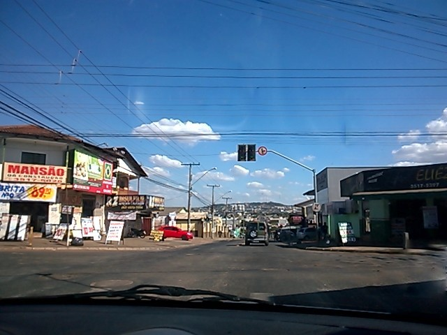 Av. Mangalô, no bairro Morada do Sol, em Goiânia. Fotografada em 21 de julho de 2015.